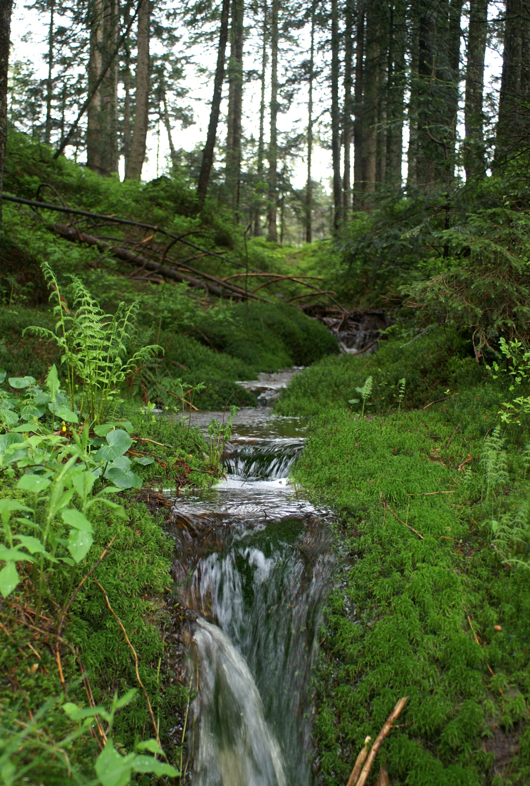 Lebensraum Foramoos (Bödele) This media shows the nature reserve in Vorarlberg with the ID 8007.